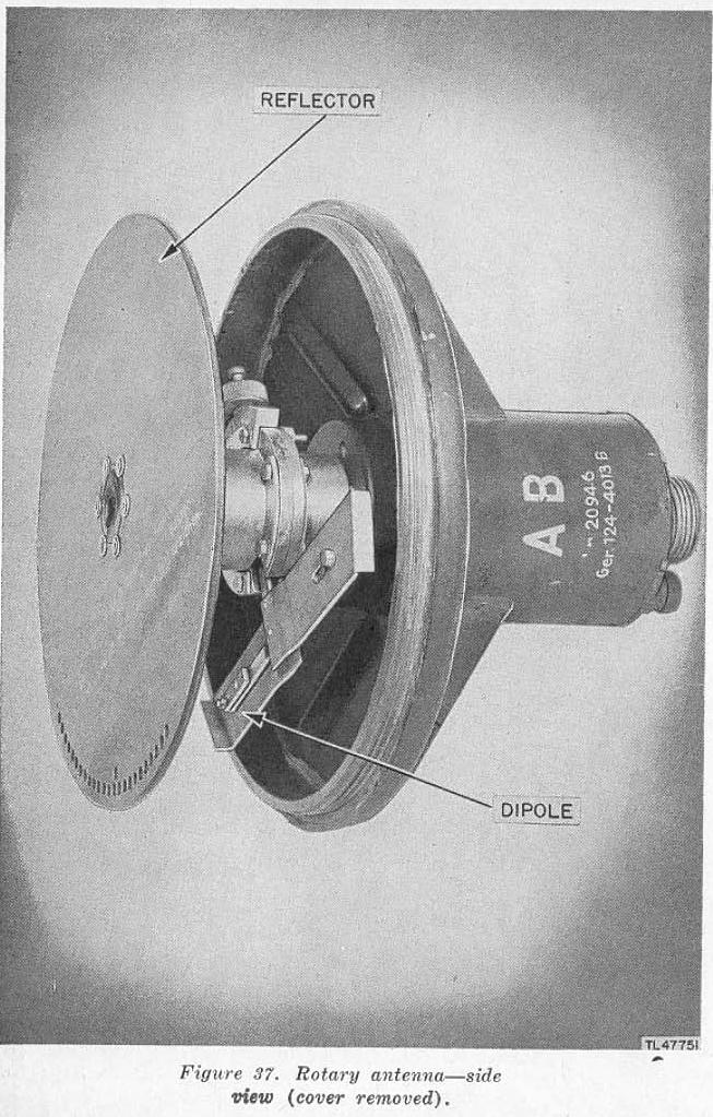 Details of the Würzburg radar rotating antenna